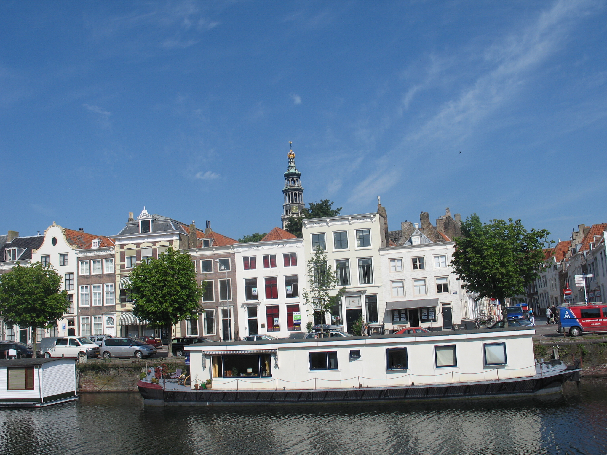 Zicht op een deel van de Londesekaai en de Nieuwstraat (rechts) op de voorgrond een woonboot en op de achtergrond de Abdijtoren